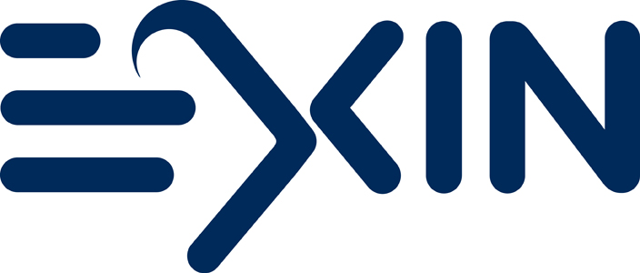 EXIN brand logo